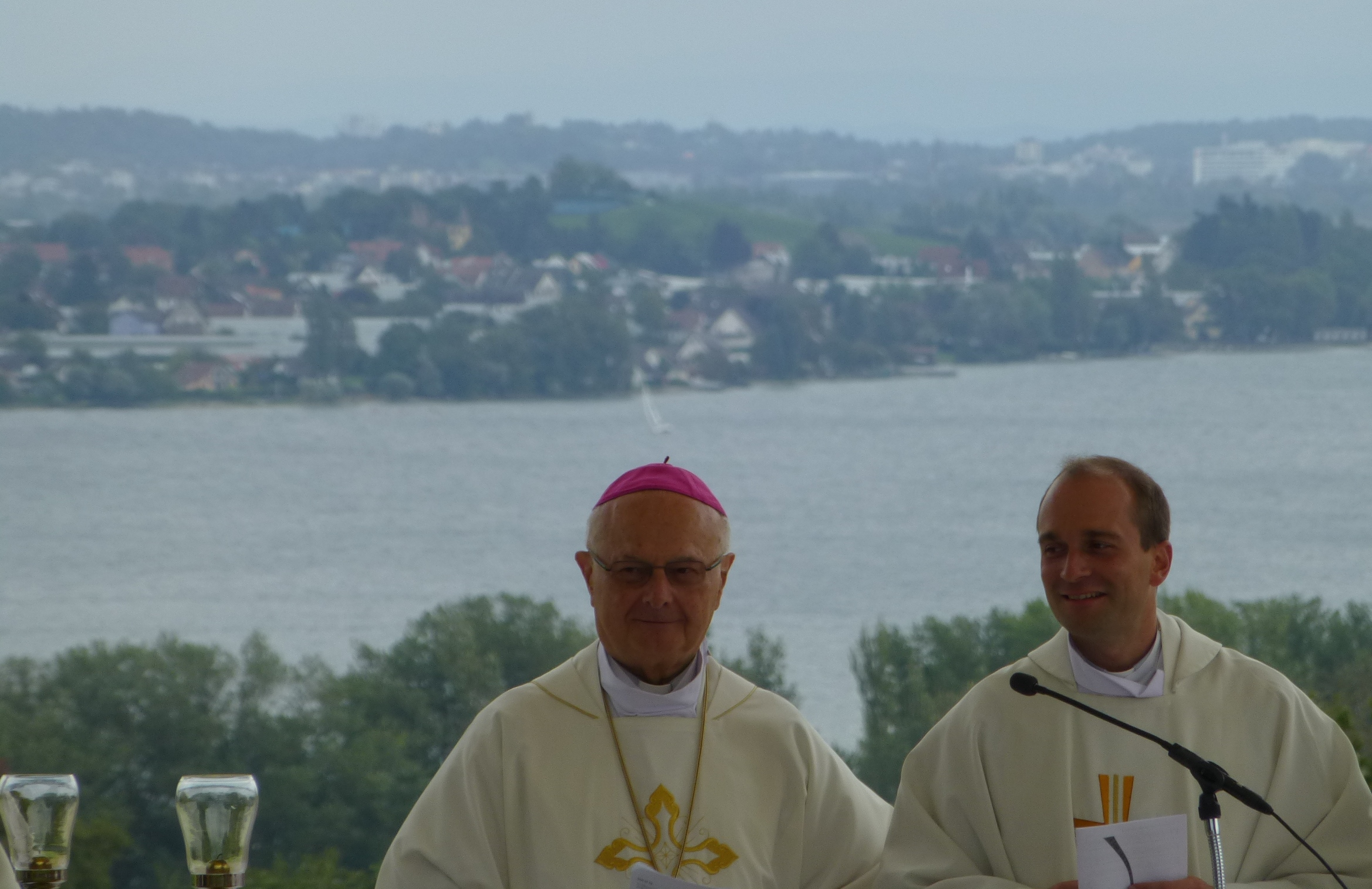 Bergmesse mit Erzbischof Dr. Robert Zollitsch in Gaienhofen-Horn